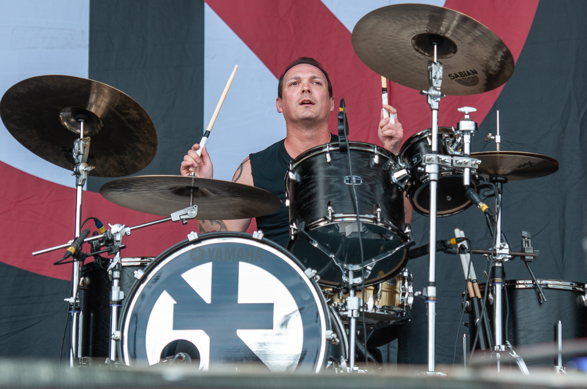 ARGO-Konzerte,Bad Religion,Festival,Jamie Miller,Konzert,Livekonzert,Livemusik,Musik,RiP,Rock im Park 2018,Zeppelin Stage